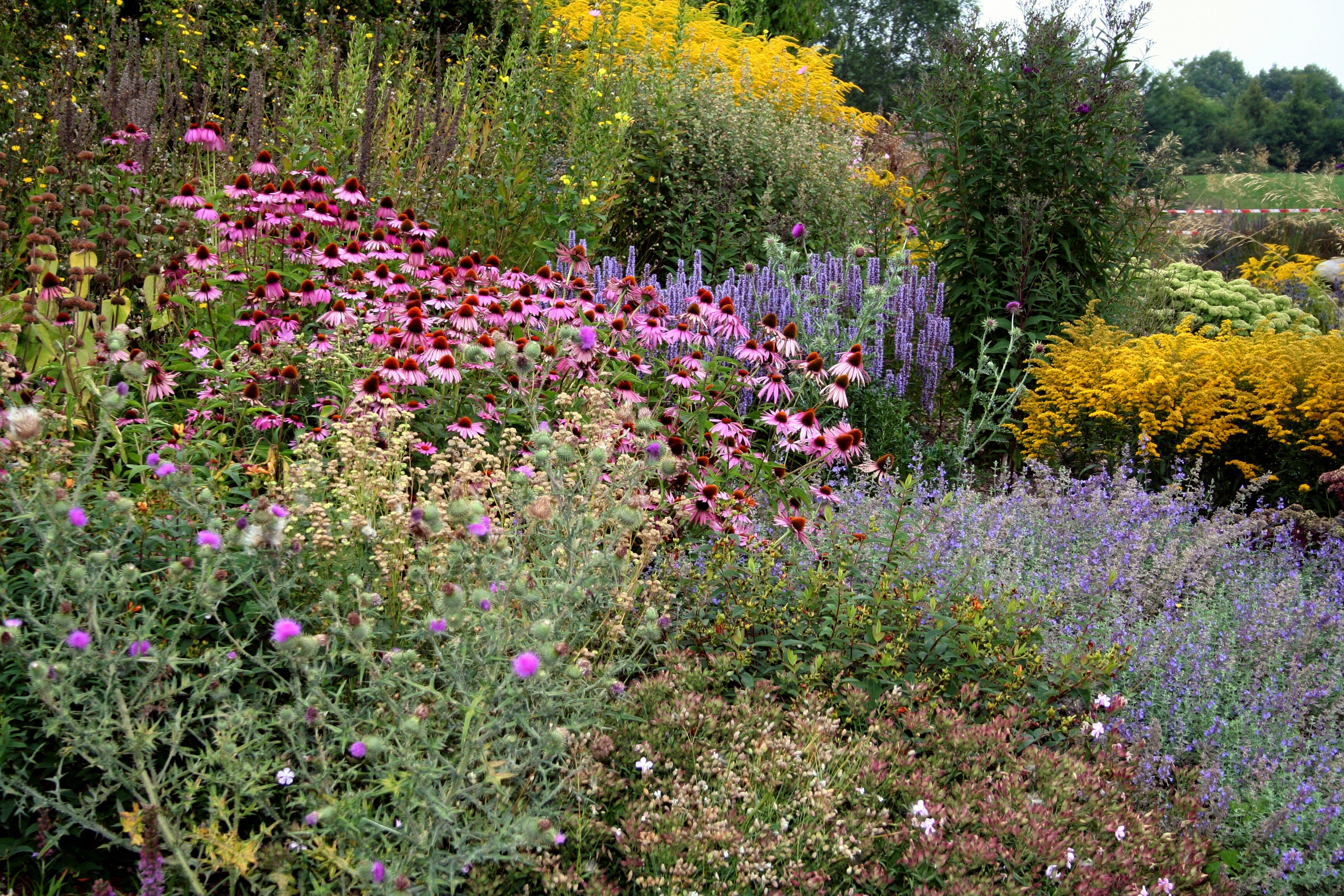 Blütenmeer im Park der Sinne, Garbsen/Hannover